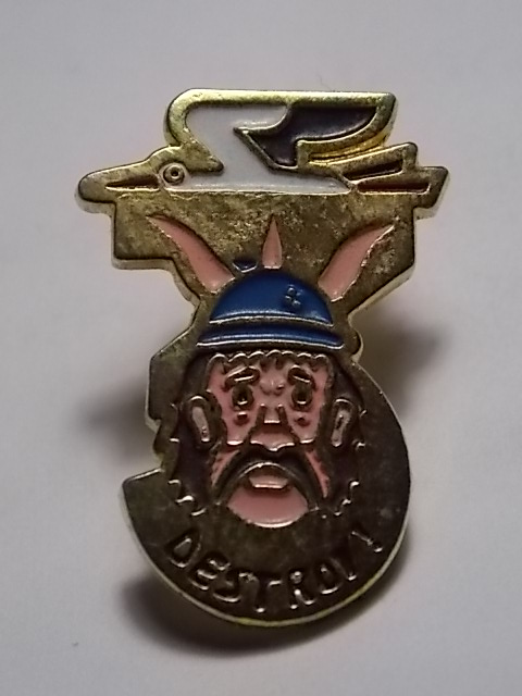 Pin's de la 3e Cie du 42e Régiment de Transmissions. Version durant la période ou le régiment était stationné en Allemagne.